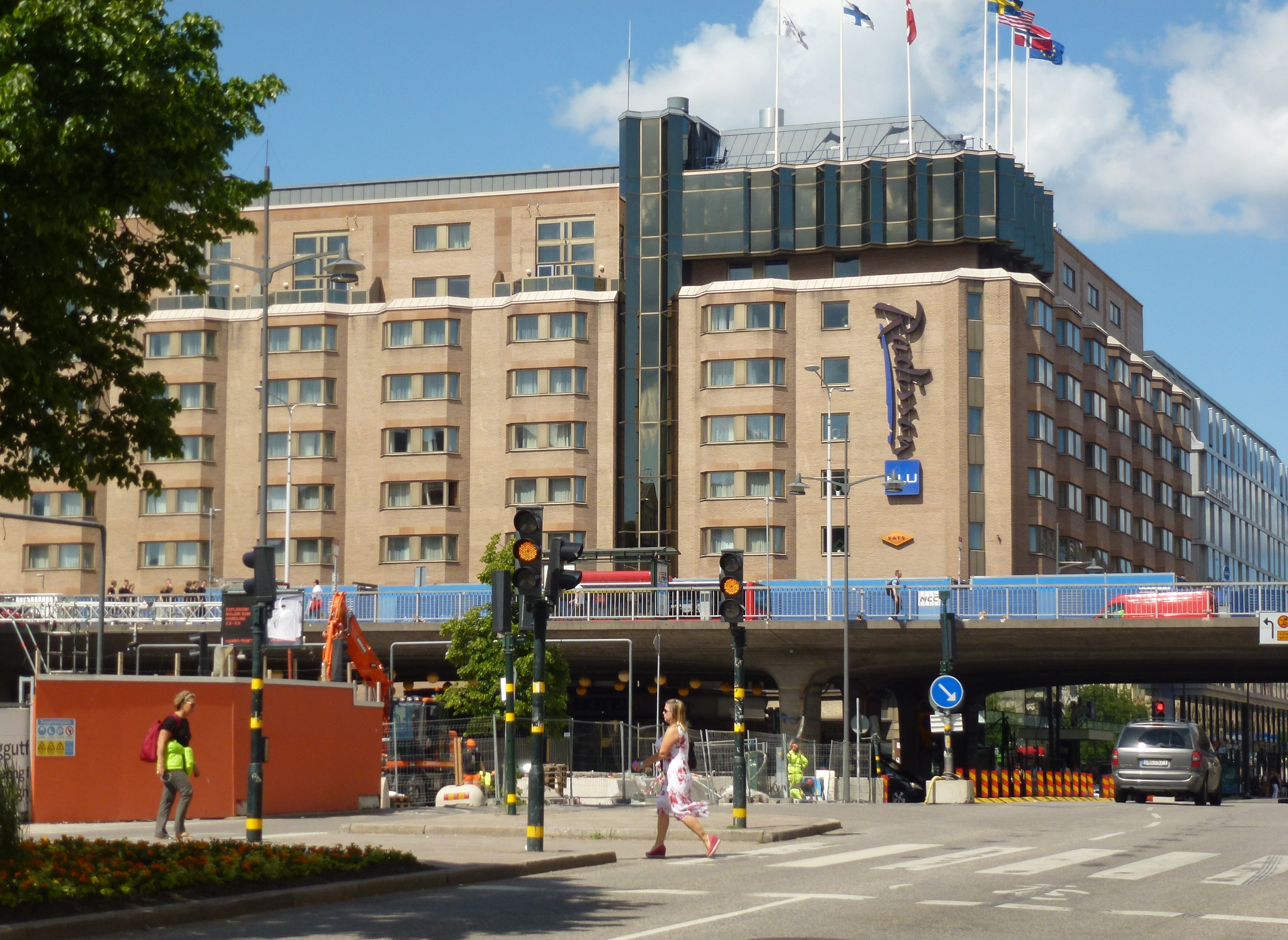 Radisson blue "Royal Viking"